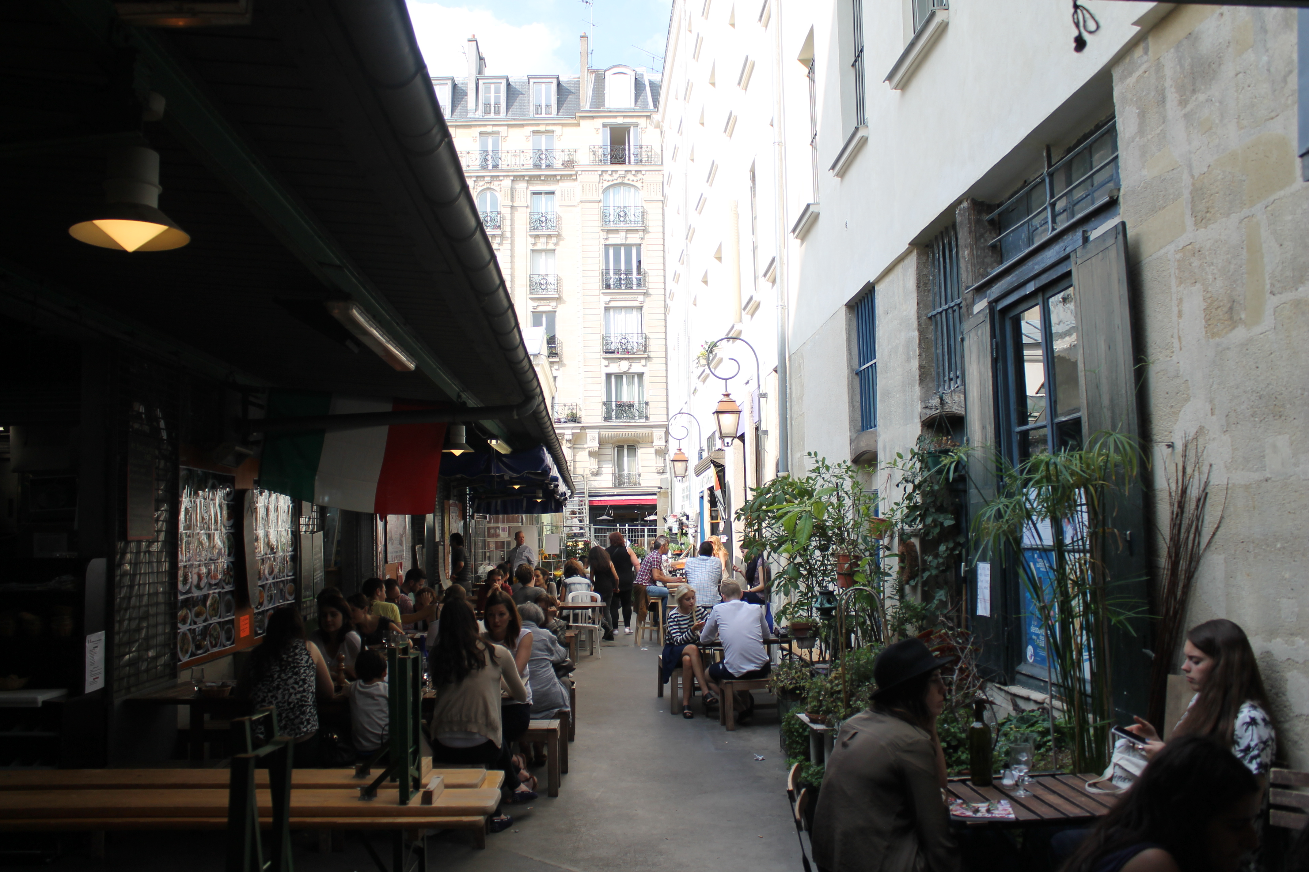 Marché des Enfants-Rouges, Paris, France.